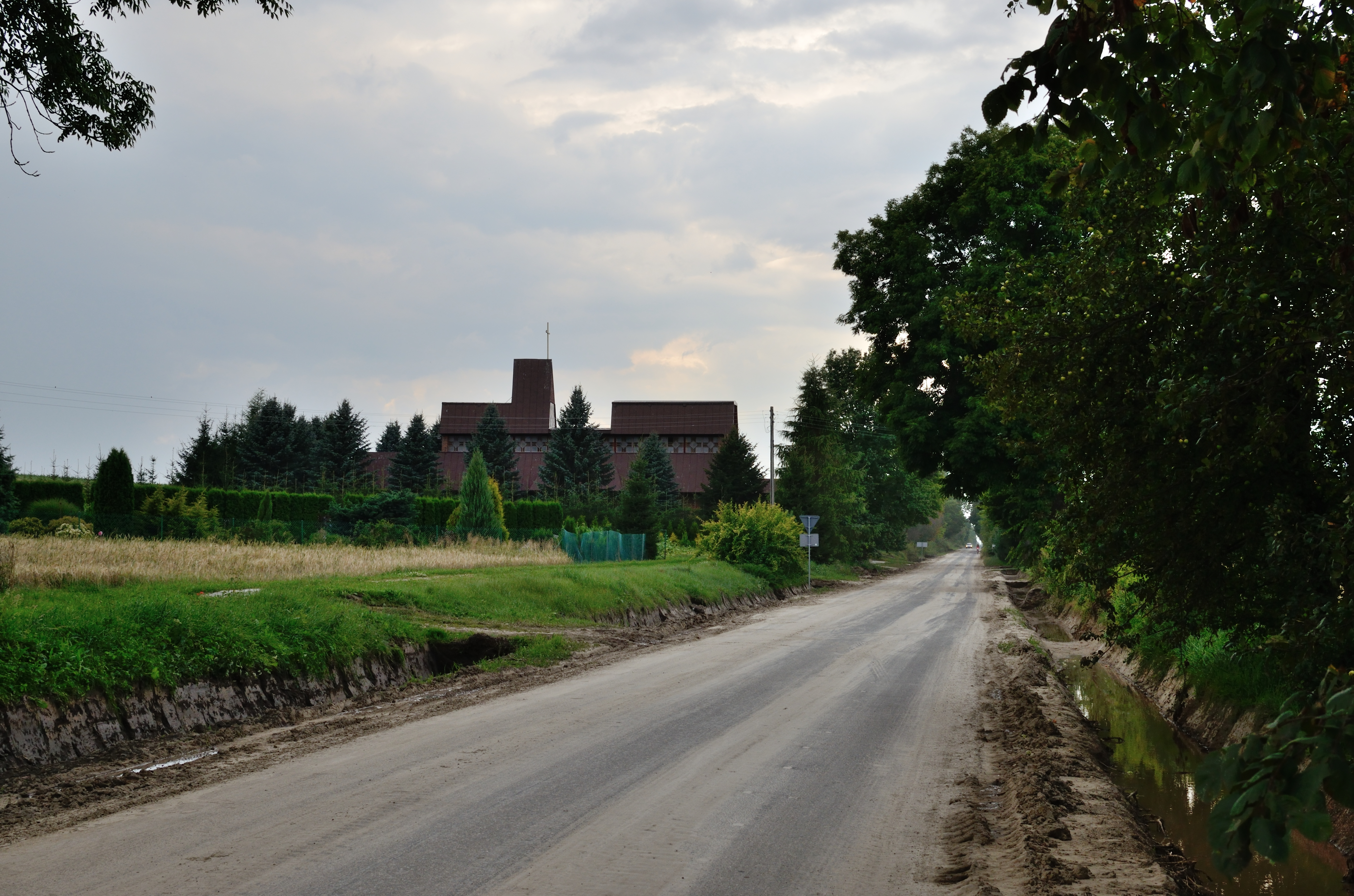 Kostel v obci Deszkowice Pierwsze, Polsko